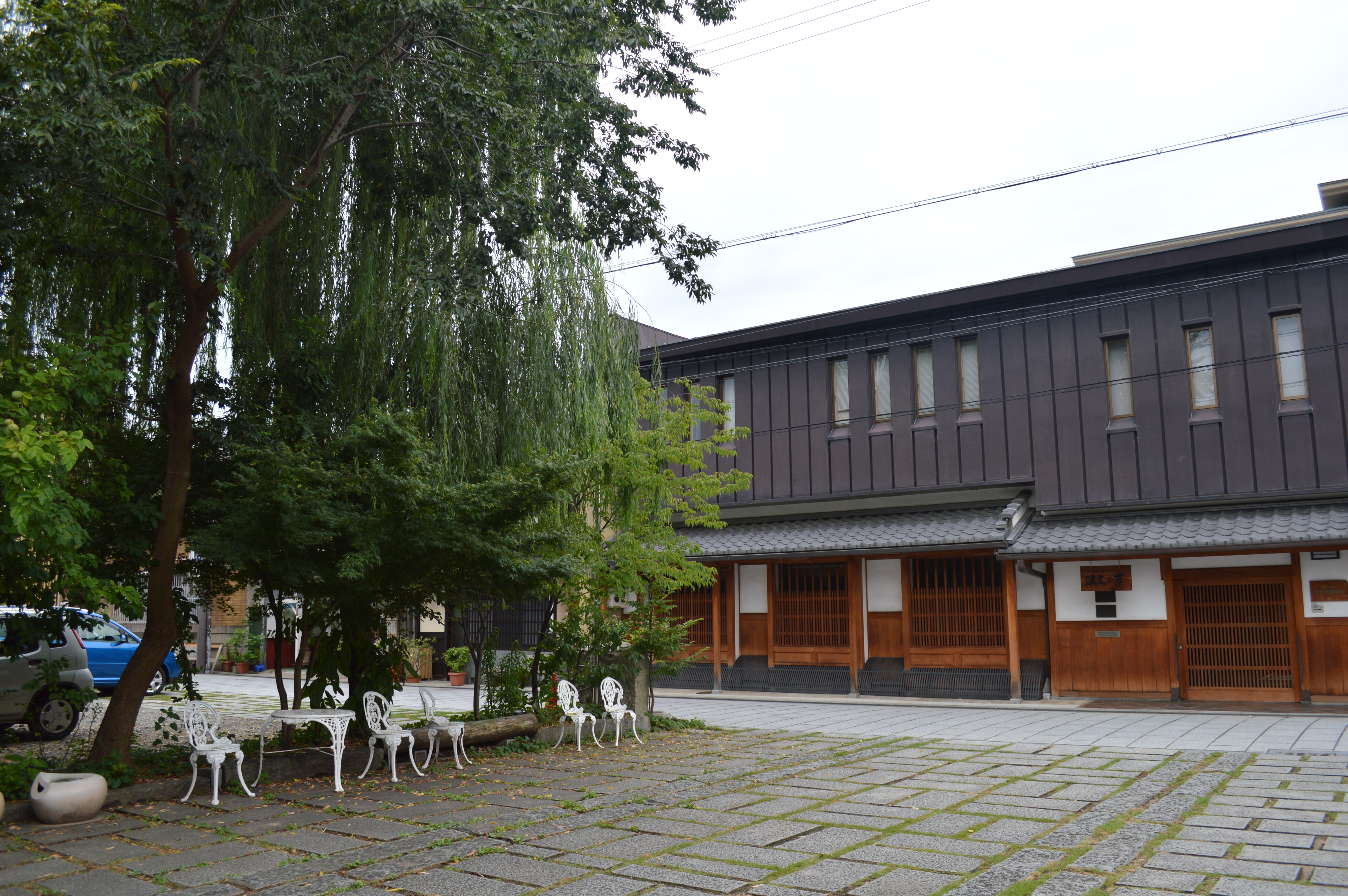 京都市上京区にある西陣地区、中心地の大黒町